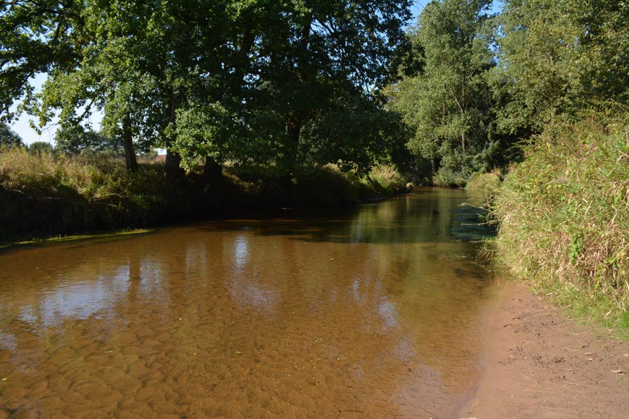 Oste